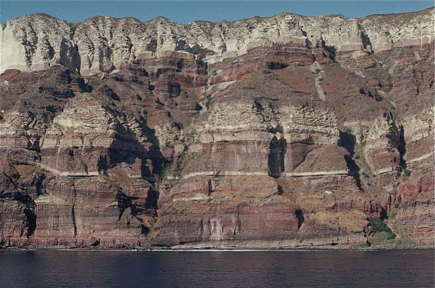 Steilküste im Westen von Santoríni